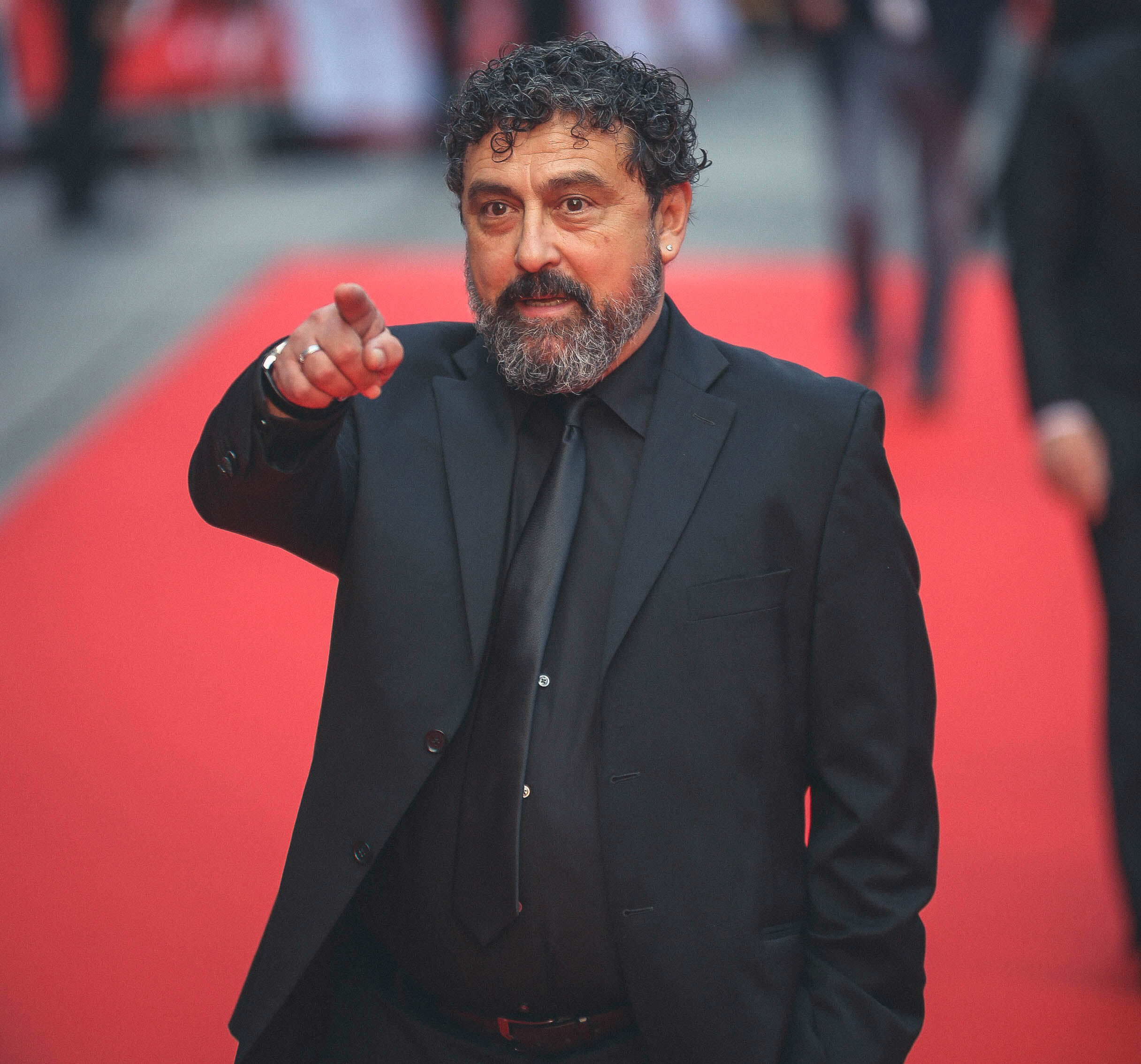 Seminci 2016